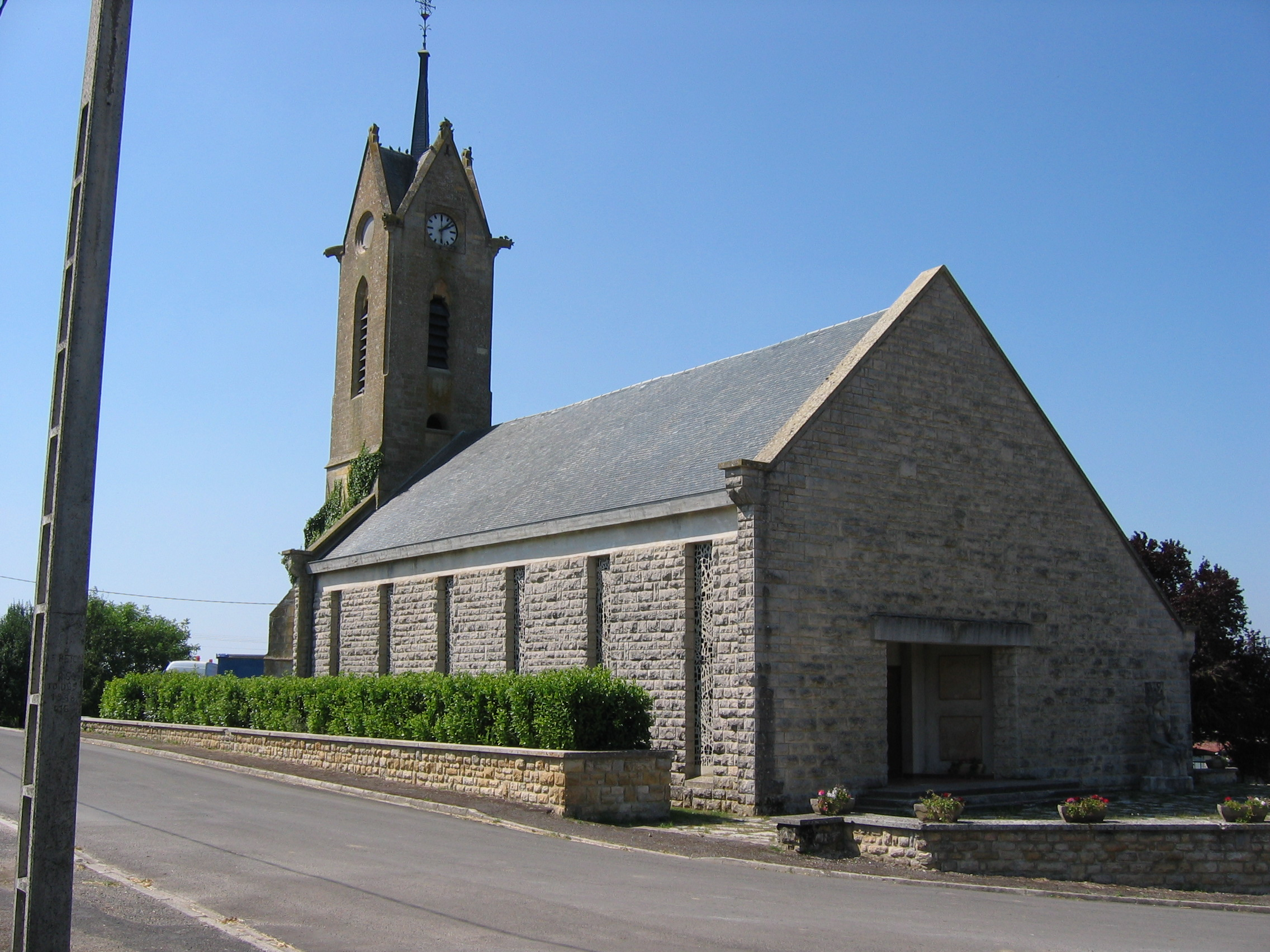 Bayonville vue 2 Eglise et son portail